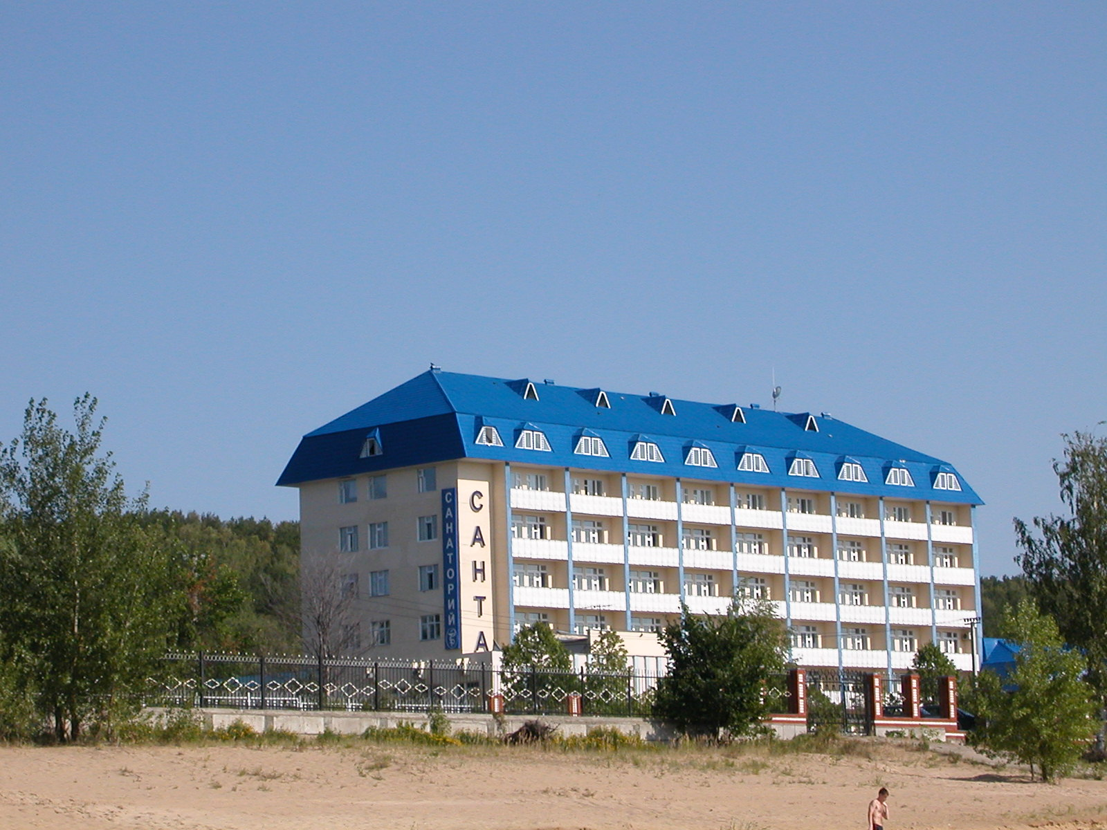 санаторий "Санта" в пос. Боровое Матюшино